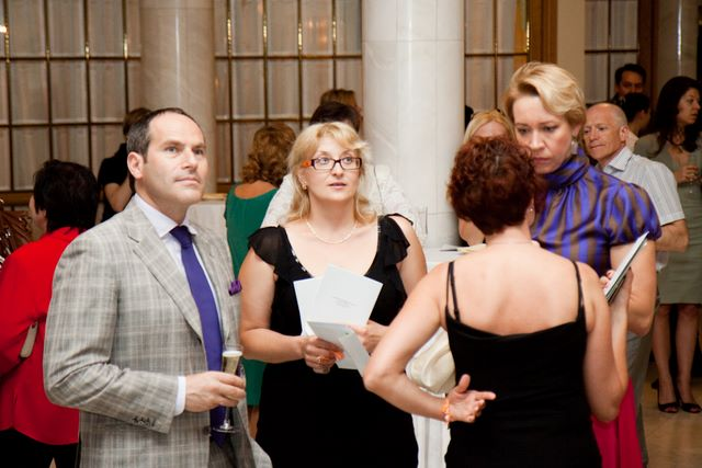 22 мая 2010 года в стенах Московского Театра «Новая Опера» состоялся театральный вечер в поддержку благотворительного фонда «Созидание». Театр Балета под руководством Бориса Эйфмана представлял спектакль «Чайка». На снимке — члены попечительского совета и сотрудники благотворительного фонда «Созидание» Михаил Шац, Елена Тимошина, Татьяна Лазарева, Елена Смирнова.